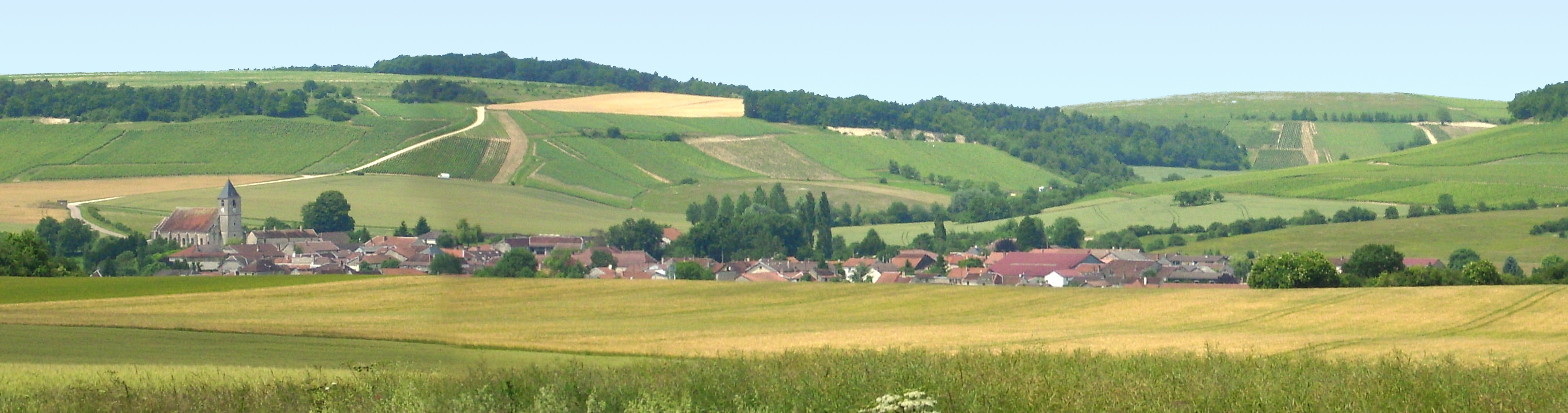 Vue panoramique de Champignol-lez-Mondeville